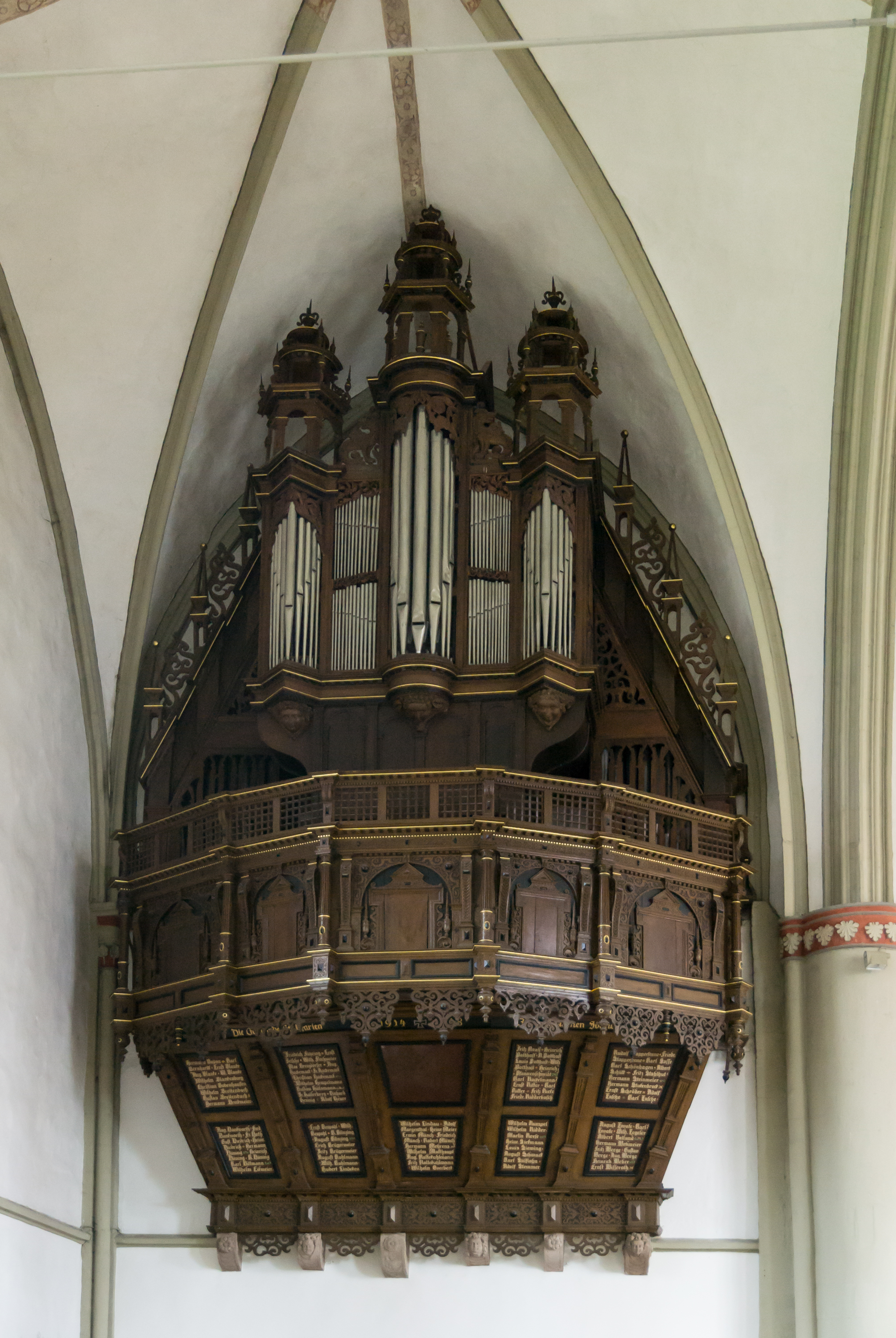 This image shows a heritage building in Germany, located in the North Rhine-Westphalian city Lemgo. Schwalbennestorgel in der evangelisch-lutherischen Kirche St. Marien in Lemgo